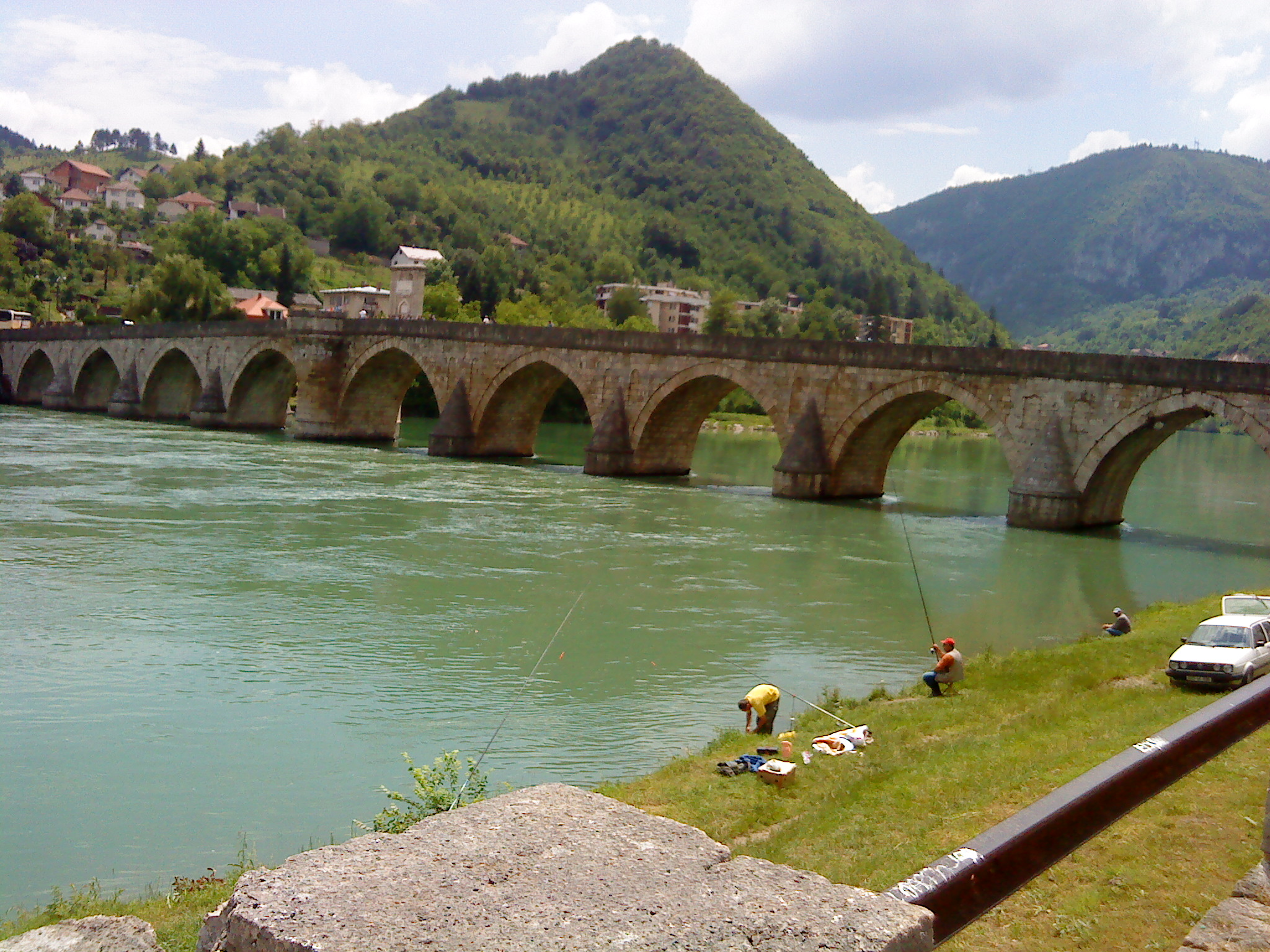 Autor: ja.